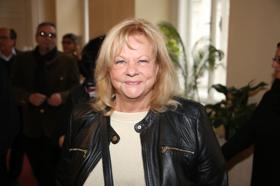 Mariane Mendt-8607